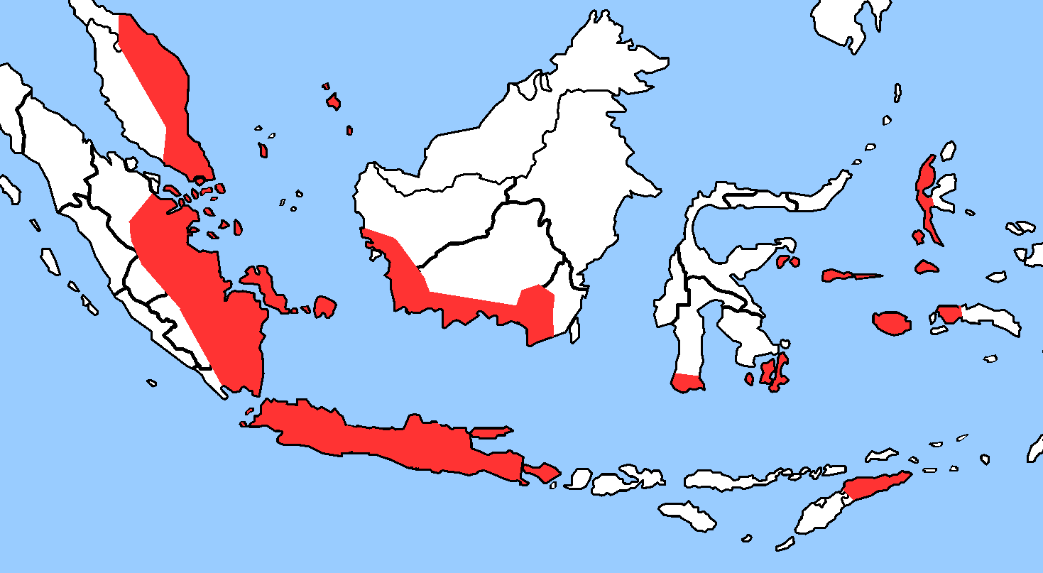 Map of Singahari